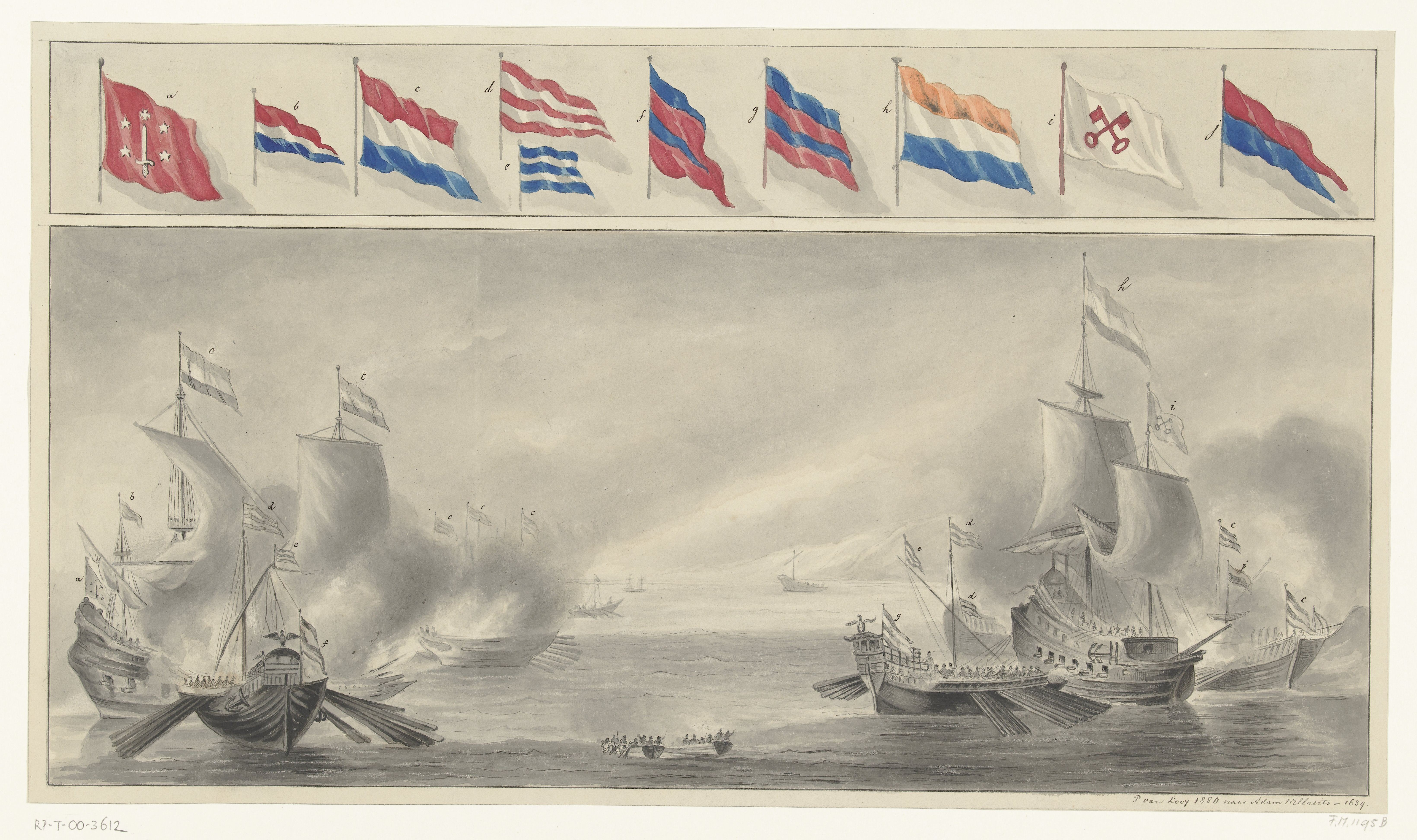 IdentificatieTitel(s): Zeeslag tussen Hollandse schepen en Spaanse galeien, 1602 of 1603Objecttype: tekening historieplaat Objectnummer: RP-T-00-3612Catalogusreferentie: FMH 1195-BOmschrijving: Zeeslag tussen Hollandse schepen en Spaanse galeien, 1602 of 1603. Voorstelling de zeeslag tussen het Staatse eskader onder leiding van vice-admiraal Jacob van Duivenvoorde, heer van Obdam, en de Spaanse galeien in het Kanaal op 3 oktober 1602, of van de zeeslag voor de kust bij Sluis Waar: bij de acht Spaanse galeien onder Federico Spinola worden verslagen door de Staatse vloot van drie schepen en twee galeien onder Joos de Moor, 26 mei 1603. Enkele van de galeien staan in brand. De vlaggen van schepen (waaronder Haarlem, Leiden) zijn aangeduid met letters en staan bovenaan in kleur afgebeeld.VervaardigingVervaardiger: tekenaar: Pieter van Looy (eigenhandig gesigneerd)naar schilderij van: Adam Willaerts (vermeld op object)Plaats vervaardiging: NederlandDatering: 1880Fysieke kenmerken: pen in grijs, penseel in grijs en kleurenMateriaal: papier Techniek: pen / penseelAfmetingen: blad: h 288 mm × b 500 mmToelichtingNaar het schilderij van Adam Willaerts in het stadhuis van Haarlem; gedateerd 1639 volgens het opschrift op de tekening, ca. 1630 volgens de catalogus van het Frans Hals Museum.OnderwerpWat: battle (+ naval force)warfare; military affairs (+ oared ships, e.g.: galley)trireme, galleyVernietiging van Spaanse galeien (1602)Vernietiging van Spaanse galeien (1603)Wanneer: 1602 - 16021603 - 16031602-10-03 - 1602-10-031603-05-26 - 1603-05-26WaarHaarlemLeidenWie: Joos de MoorFederico Spinolaheer van Obdam, Jacob van DuivenvoordeVerwerving en rechtenVerwerving: aankoop 1881Copyright: Publiek domein